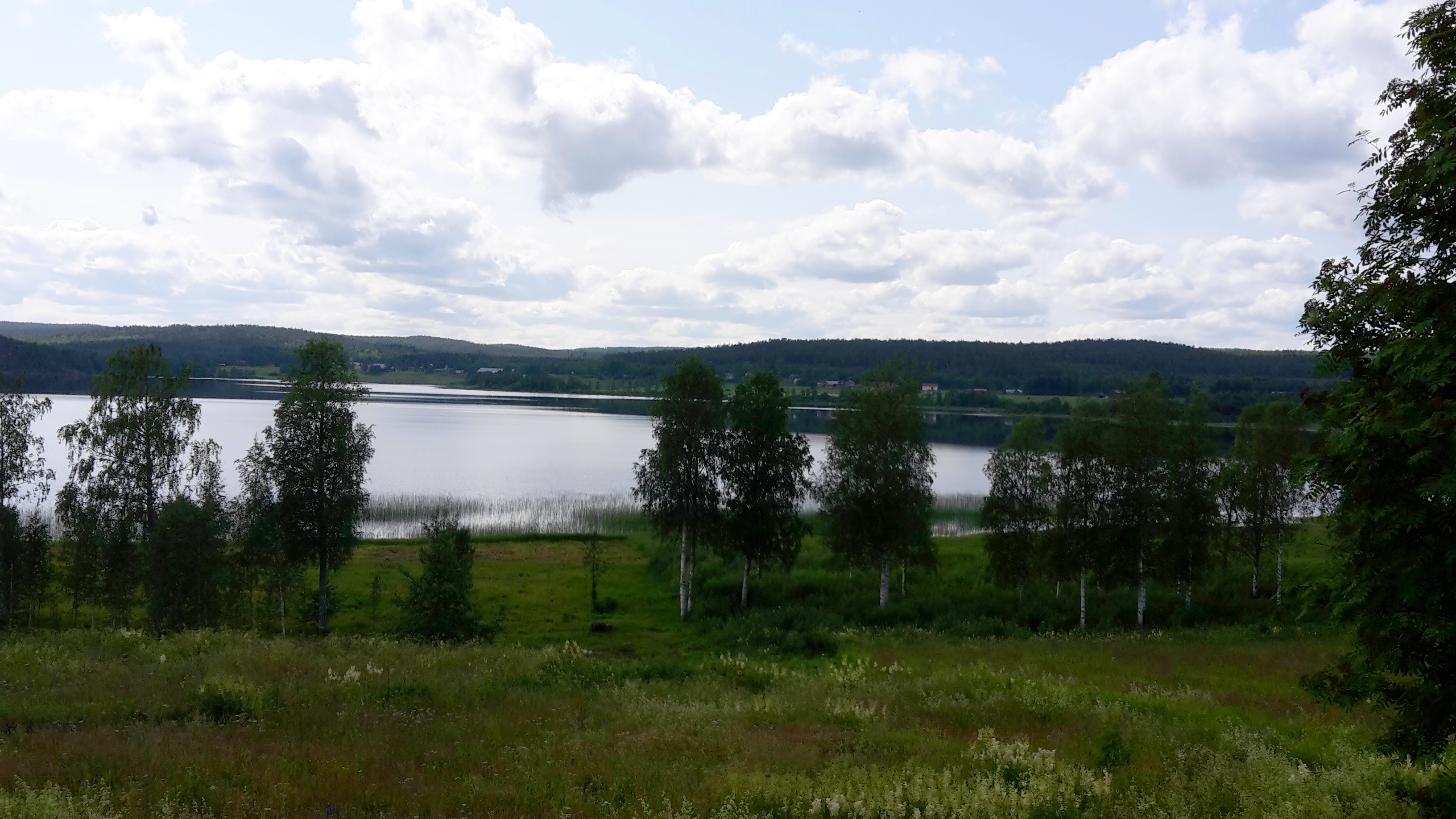 Sunnansjön fotograferad från Baggård på norra sidan av sjön.